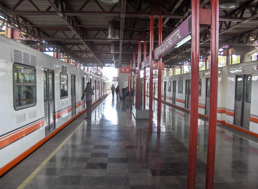 Vista interna de la estacion Agricola Oriental de la linea A